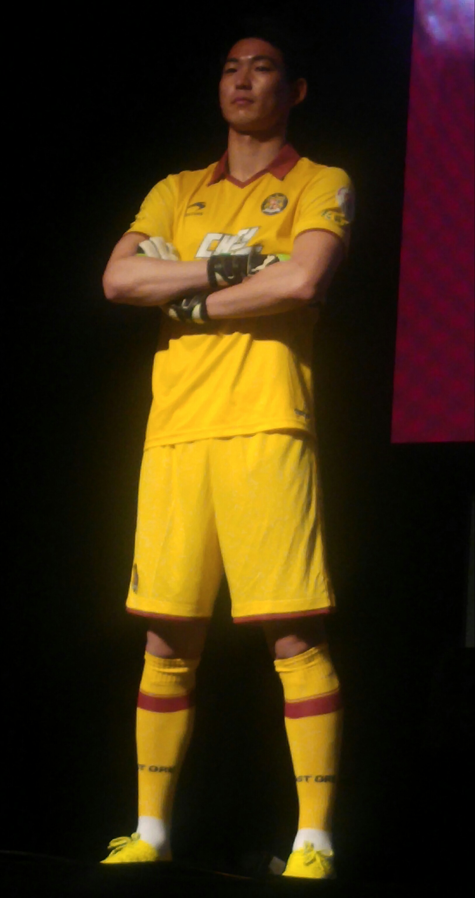 대전시티즌 출정식에서의 김진영